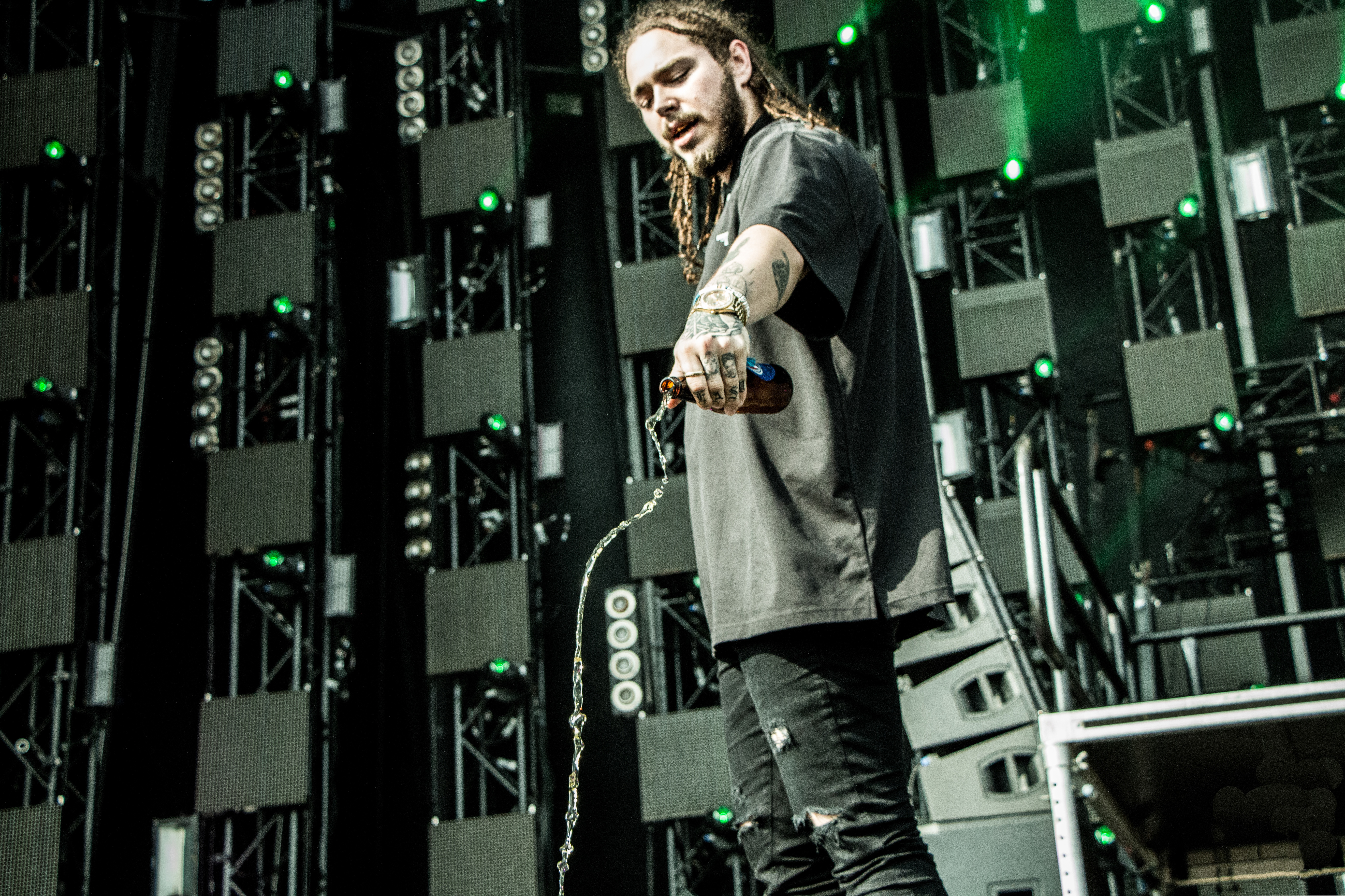 VELD 2016